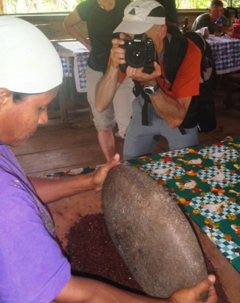 Demostración de proceso de cacao en la Comunidad Indígena de Yorkín, Talamanca, Costa Rica